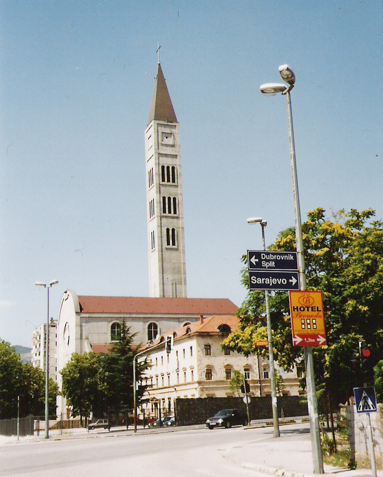 Franziskaner-Kirche in Mostar, Bosnien-Herzegowina.